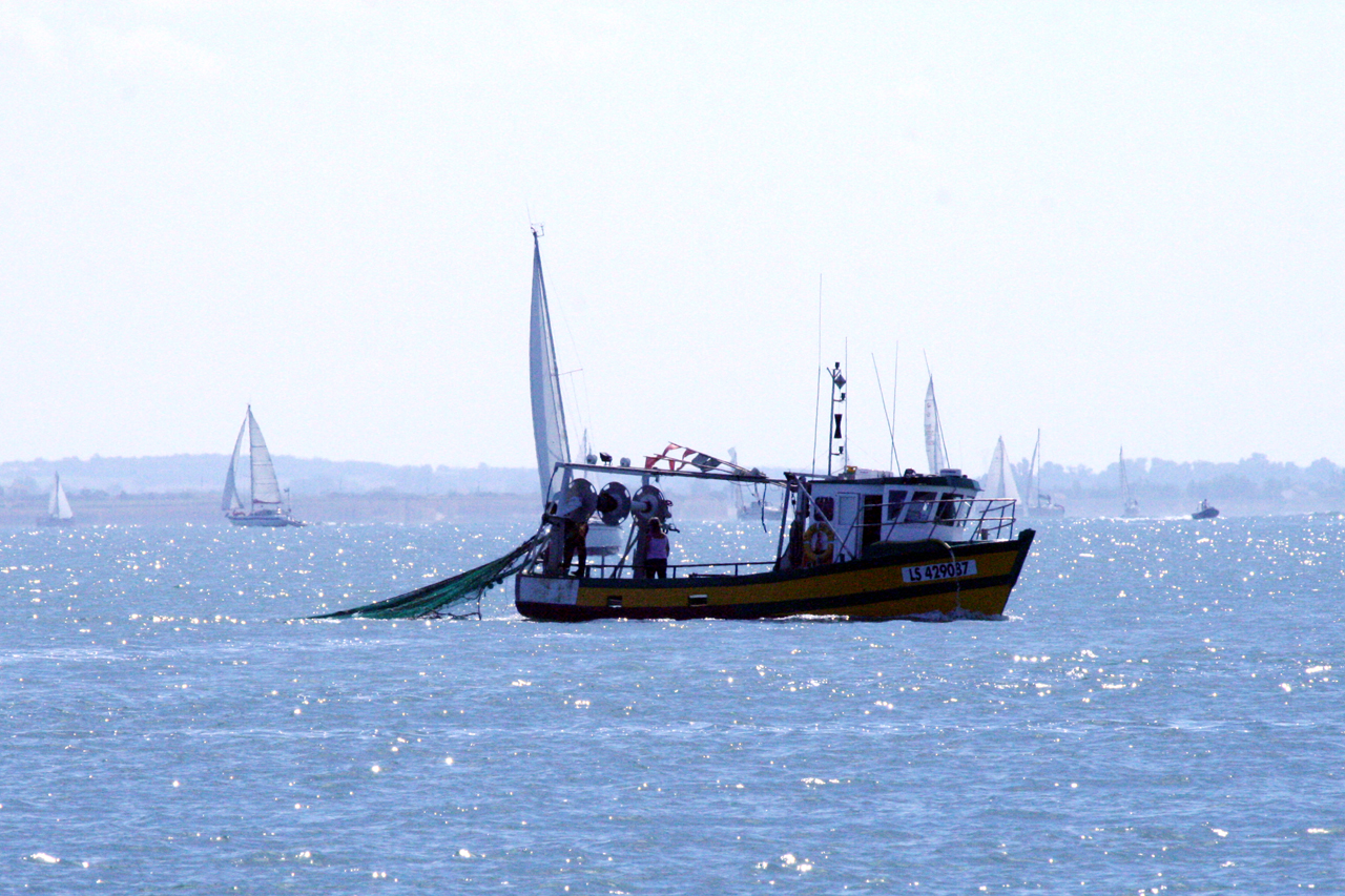 Bateau de pêche